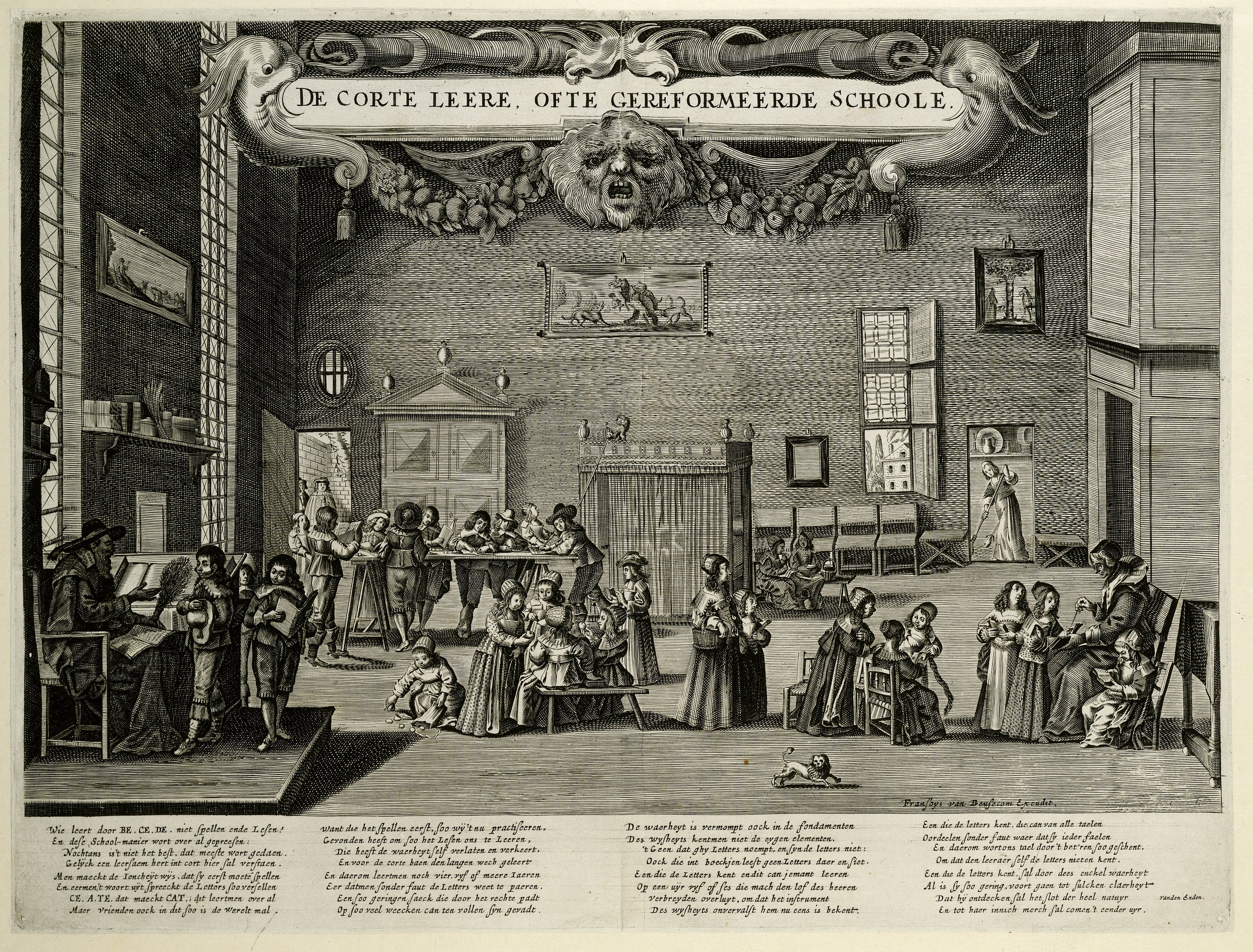 IdentificatieTitel(s): Gereformeerde school, ca. 1650De Corte Leere ofte Gereformeerde Schoole (titel op object)Objecttype: prent Objectnummer: RP-P-OB-76.883Catalogusreferentie: FMH 1987Opschriften / Merken: opschrift, midden boven: ‘DE CORTE LEERE...SCHOOLE.’adres, rechtsonder: ‘Fransoys van Beusecom Excudit.’onderschrift, m.o. in vier achtregelige kolommen: ‘Wie: leert door . niet Spellen ende Lesen?....En tot haer innich merch sal comen 't eender uyr.’Omschrijving: Een schoolvertrek, Waar: in links een schoolmeester aan een lessenaar aan twee jongens, rechts een schooljuffrouw aan drie meisjes aan de knie staande, onderwijs geeft. Van achteren links meerdere jongens staande aan een tafel; in het midden op de voorgrond spelende meisjes. Daar achter een ledikant etc. In het onderschrift 4 verzen van elk 8 regels, in het Nederlands.VervaardigingVervaardiger: prentmaker: anoniemnaar prent van: Abraham Bosseuitgever: Francoys van Beusekom (vermeld op object)schrijver: Franciscus van den Enden (vermeld op object)Plaats vervaardiging: Noordelijke NederlandenDatering: 1642 - 1665Fysieke kenmerken: gravureMateriaal: papier Techniek: graveren (drukprocedé)Afmetingen: plaatrand: h 405 mm × b 535 mmToelichtingKopie naar twee prenten van Abraham Bosse, Duplessis nrs. 1389 en 1390.OnderwerpWat: schoolonderwijs, onderwijsteacher and pupilWanneer: 1640 - 1660Verwerving en rechtenVerwerving: aankoop 1881Copyright: Publiek domein